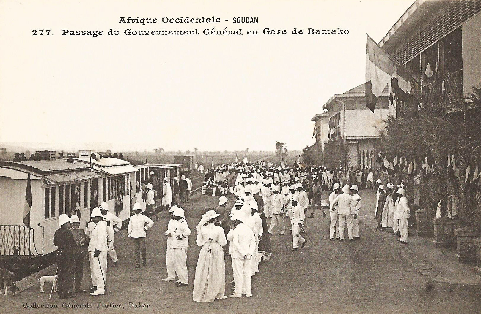 François-Edmond Fortier, Passage du Gouvernement général en gare de Bamako. Afrique Occidentale - Soudan.